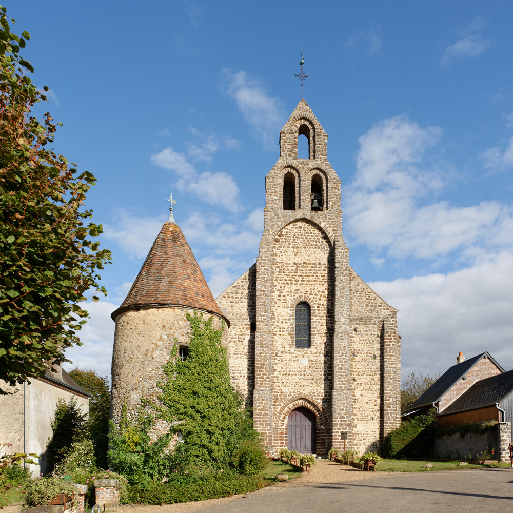 Église Notre-Dame d'Arville (Loir-et-Cher, France) .